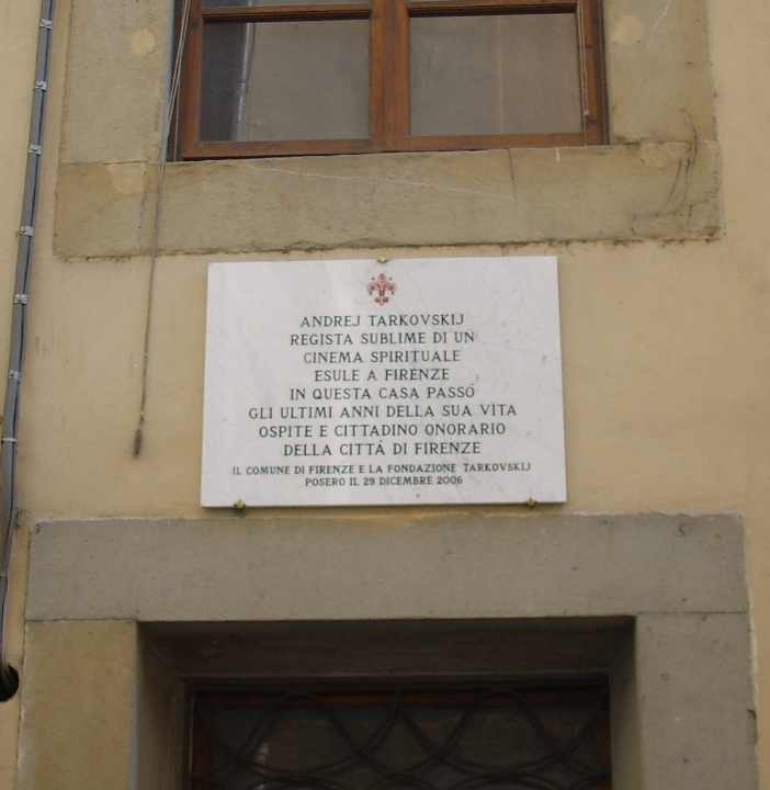 Palazzo gianni vegni, targa A. Tarkowskij